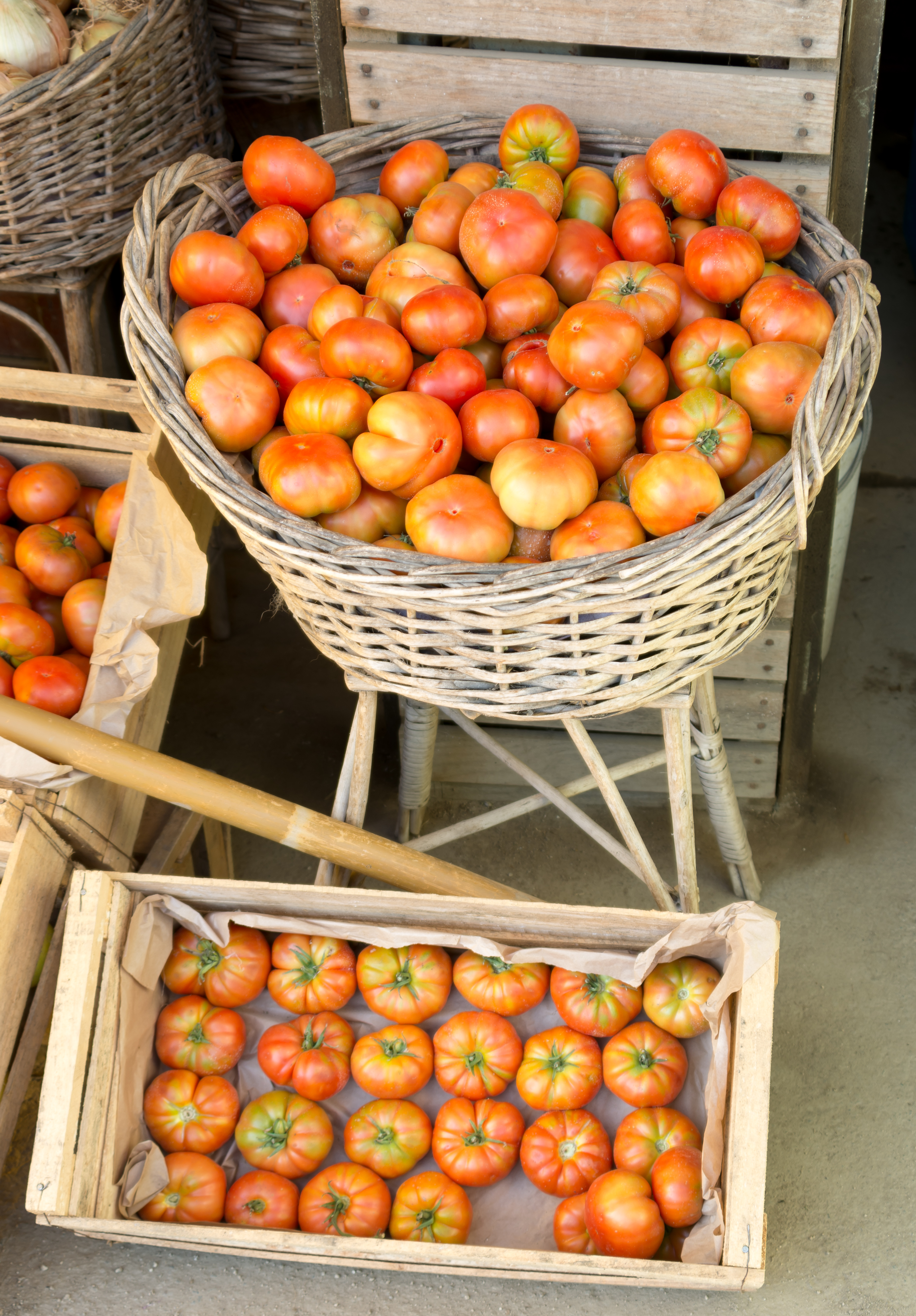 Tomate limachino, Limache, Región de Valparaíso, Chile